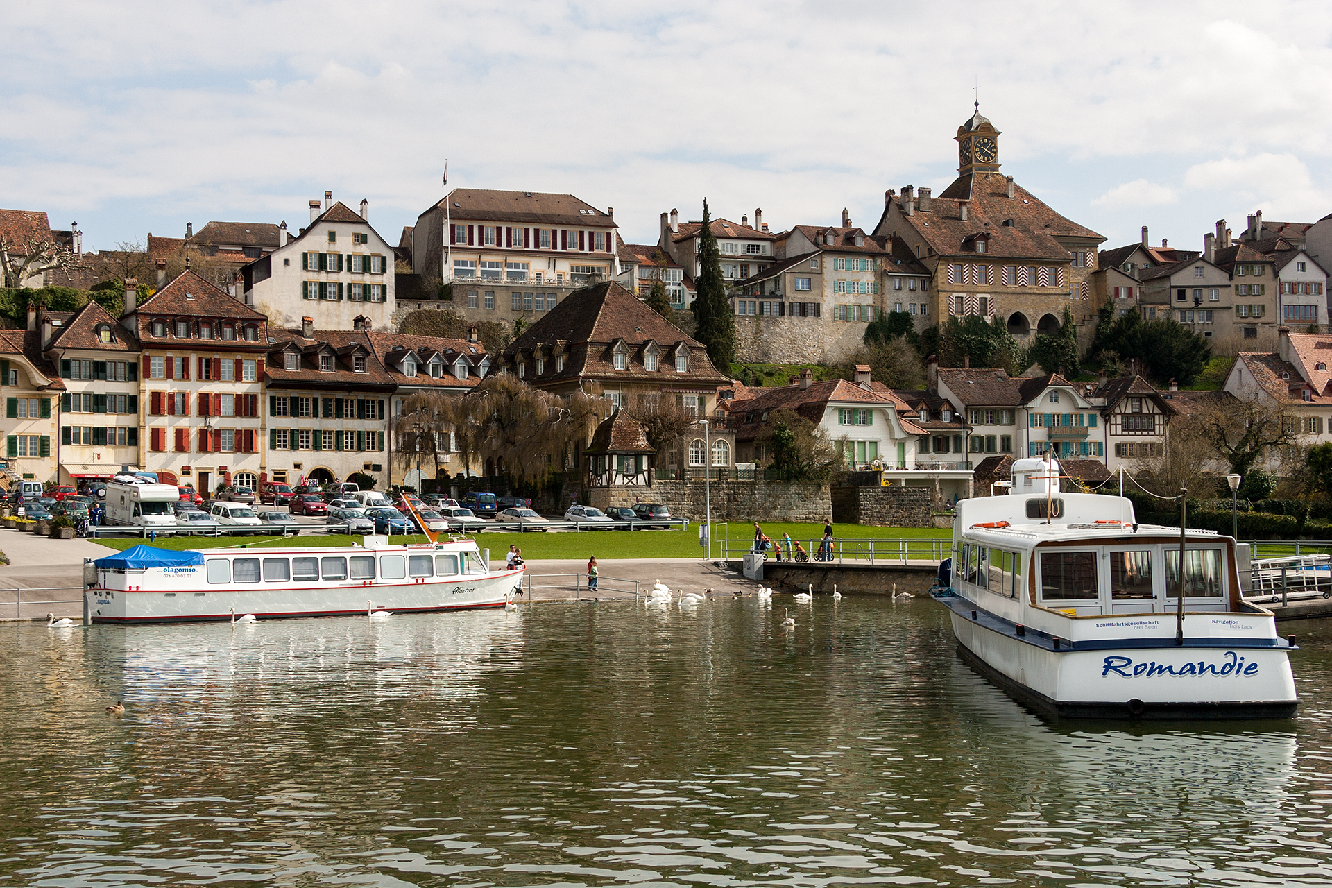 Hafen mit Blick zur Altstadt Murtens (FR)